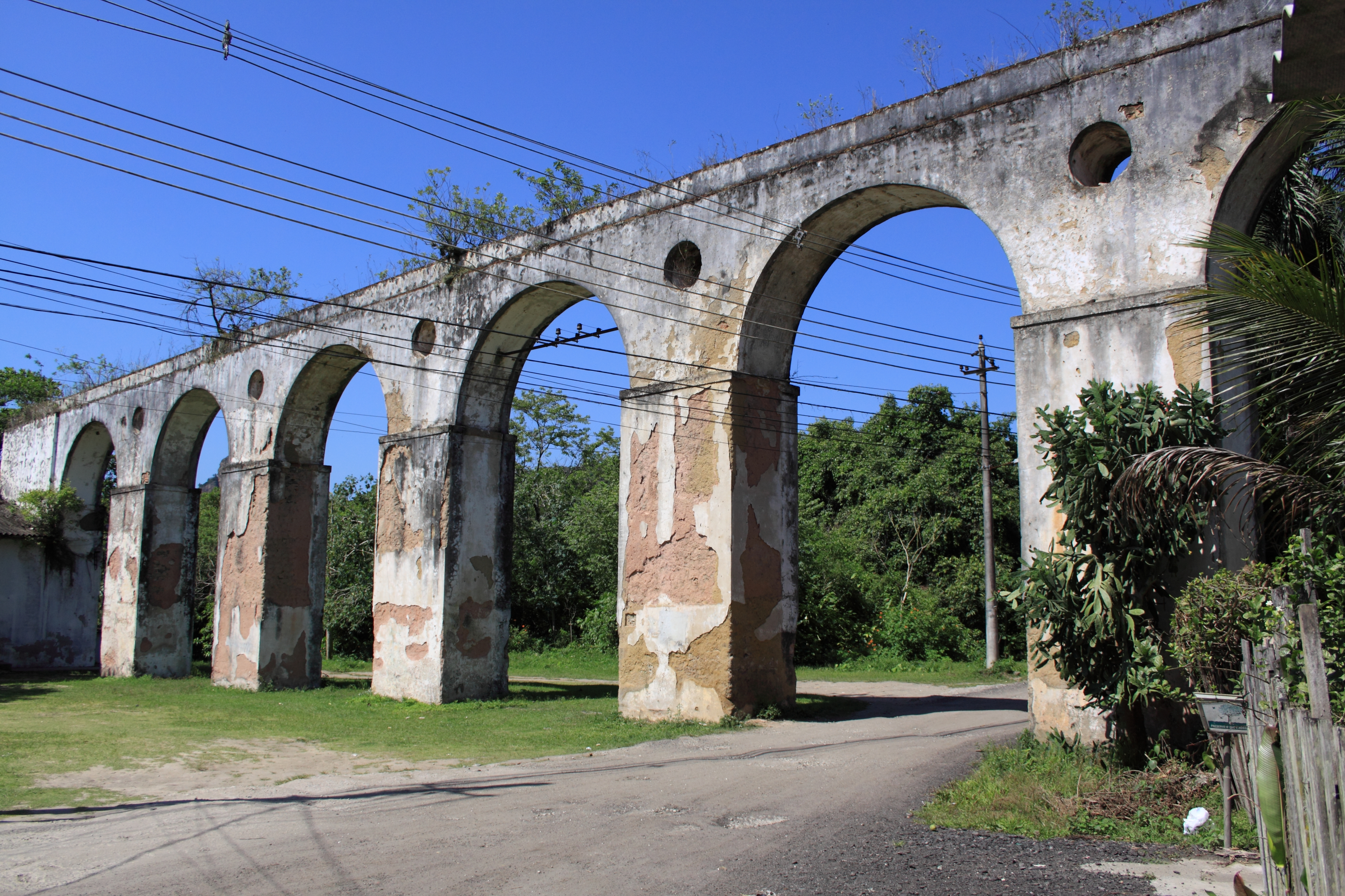 Aqueduto, do final do século XVIII, composto de uma série de arcos simples e que conduzia água a um dos antigos engenhos de Jacarepaguá. IPHAN